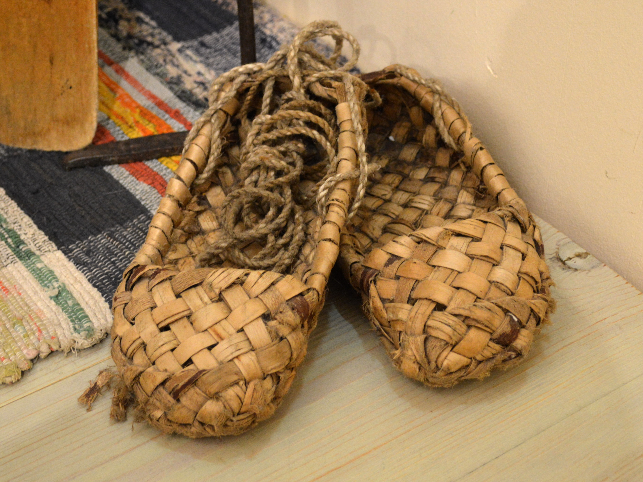 Лапти. Котельнический уезд, 1-я пол. 20 в.